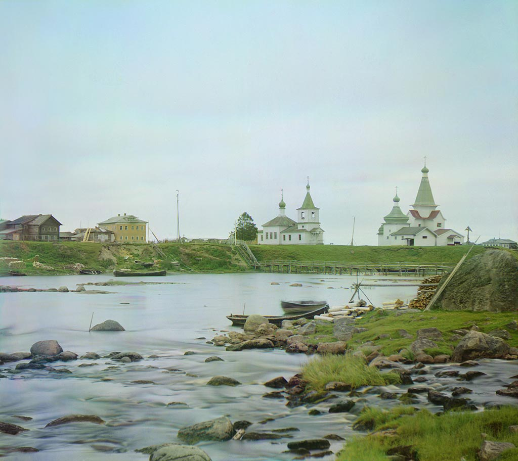 [Село Шуя (Шуерецкое). Климентовская, Пятницкая и Никольская церкви.] [1916 год]